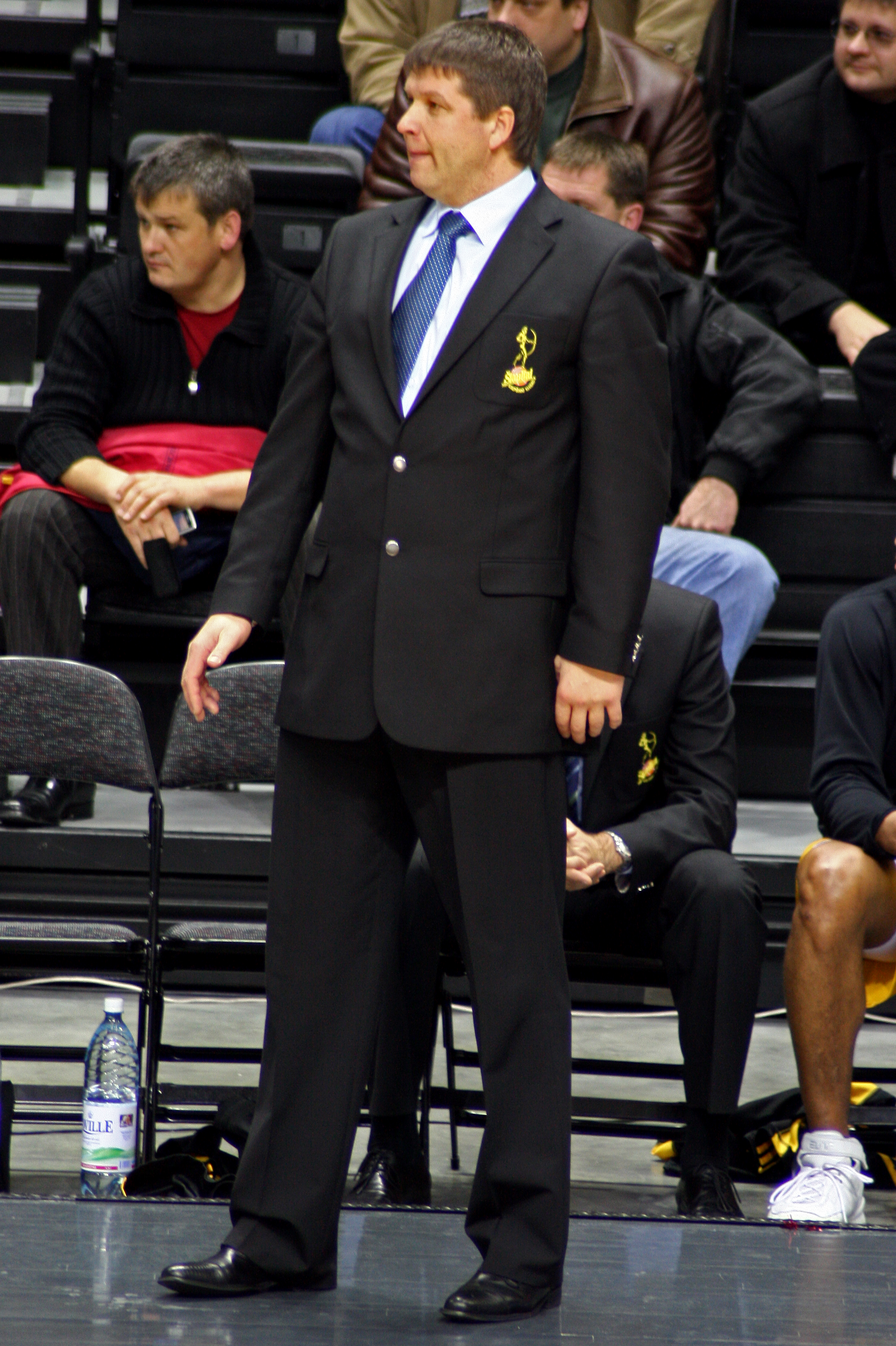 Robertas Kuncaitis